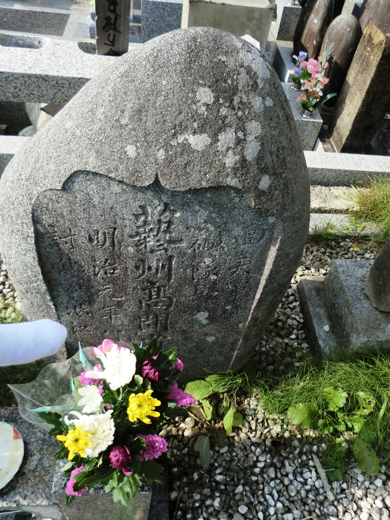 慶応４年８月１日、浪江の戦いで、砦に一番乗りした瞬間、敵弾が頭部に当たり戦死する。 現在は福島・双葉町の自性院に眠るが、放射能汚染地で参拝がむずかしい。